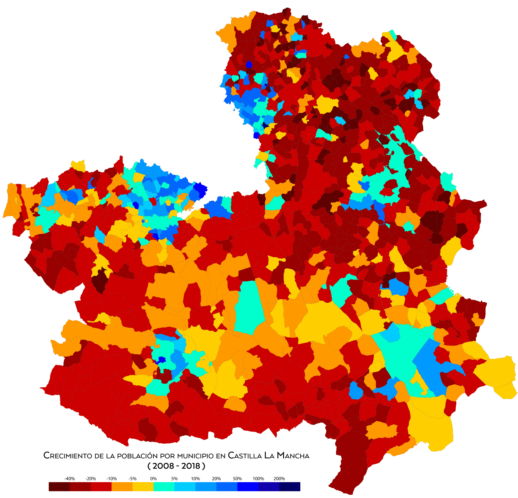 Crecimiento de la población por municipio en castilla la Mancha entre 2008 y 2018.